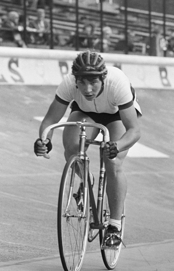 WK Wielrennen te Amsterdam dames achtervolging. De Russin Gorkushina in aktie